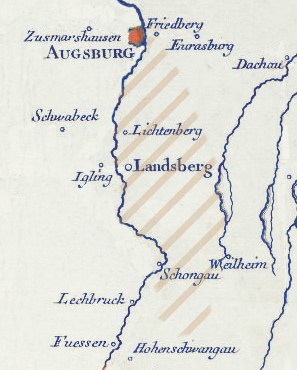 Geographie Lechrain